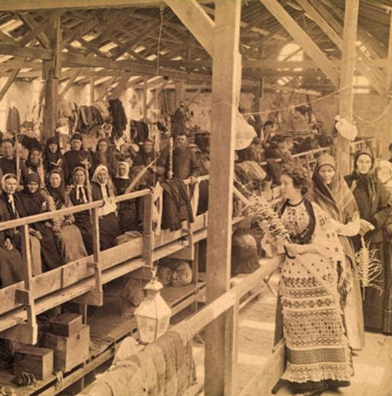 Russian pilgrims